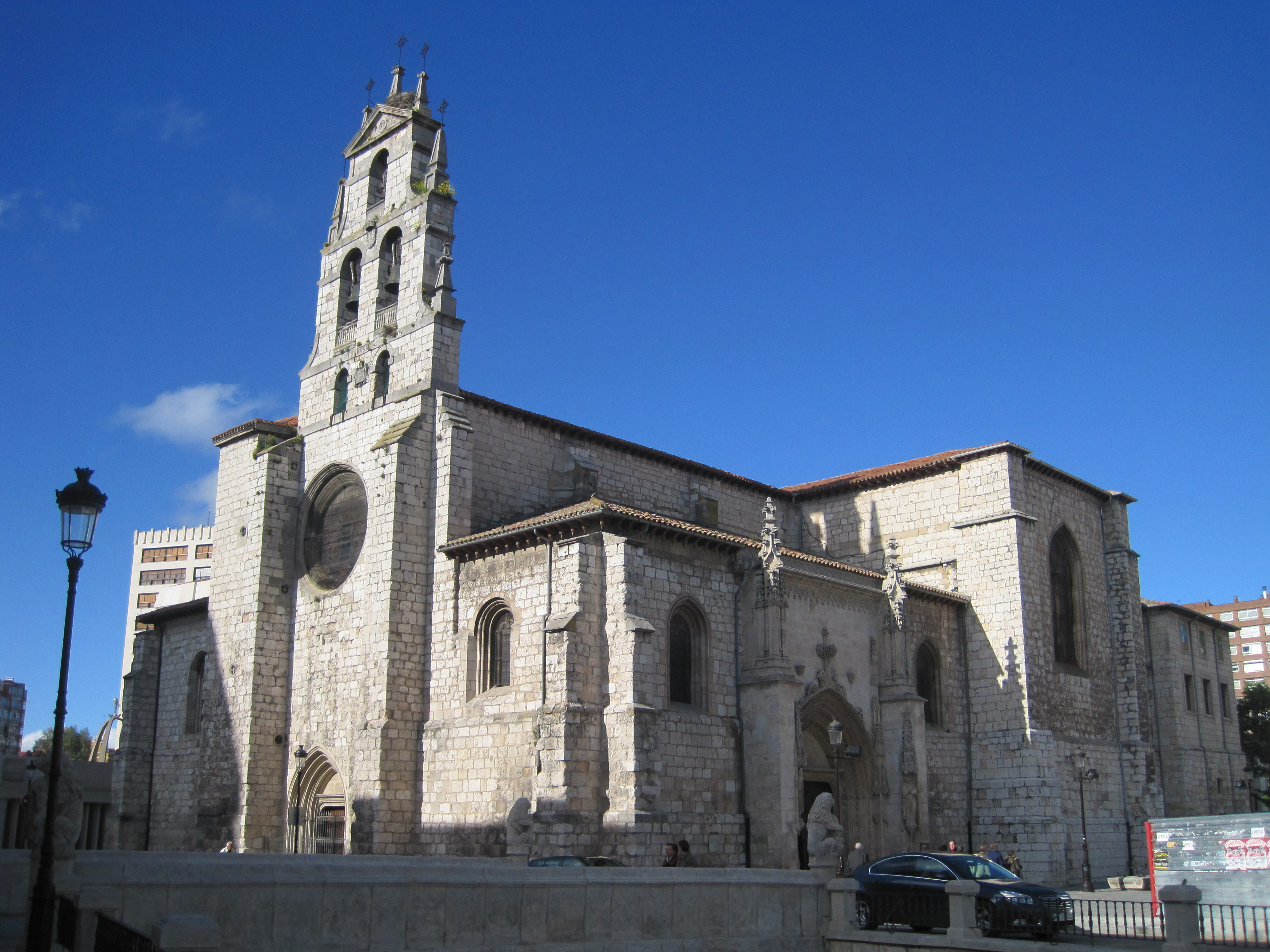 Vista exterior de la Iglesia de San Lesmes, Burgos.